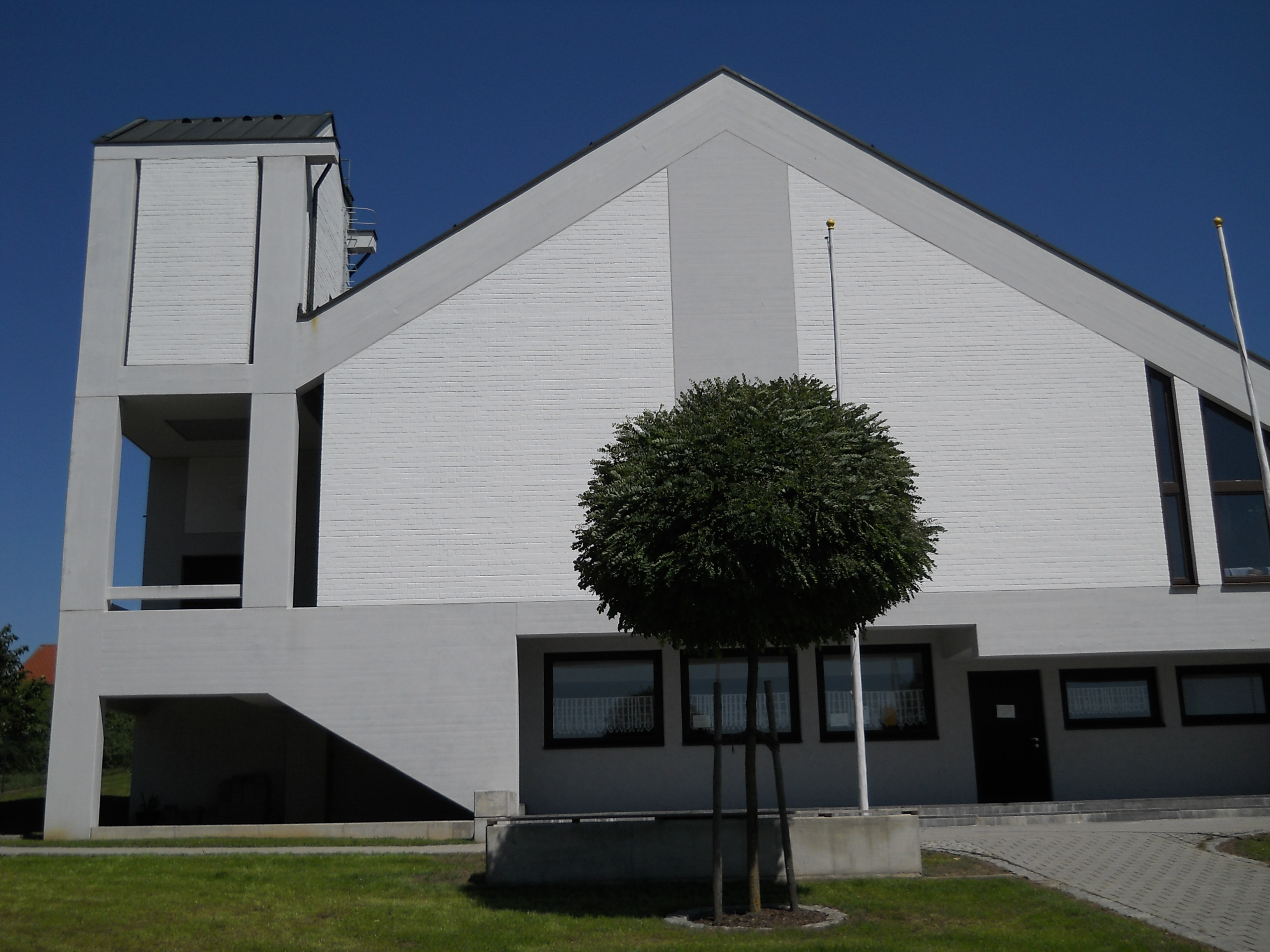 Schelldorf, Gemeindeteil von Kipfenberg im oberbayerischen Landkreis Eichstätt, neue Pfarrkirche von Architekt Zitzelsberger, Ingolstadt